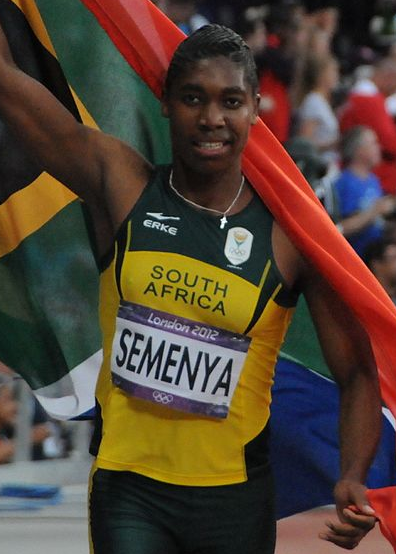 La sud africaine: Caster Semenya, médaille d'argent aux 800m